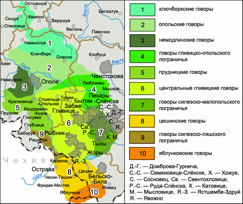 Карта распространения силезских говоров согласно исследованиям А. Зарембы. Источник: Winiarska I. Pod redakcją Haliny Karaś: Opis dialektów polskich. Dialekt śląski. Zasięg terytorialny i podziały dialektu. Współczesny zasięg gwar śląskich. Rozmieszczenie dialektów śląskich (wg A. Zaręby). Dialektologia Polska. Dialekty i gwary polskie. Kompendium internetowe.